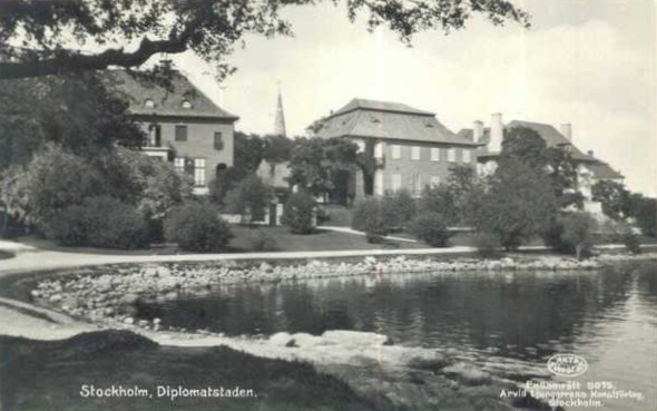 Diplomatstaden